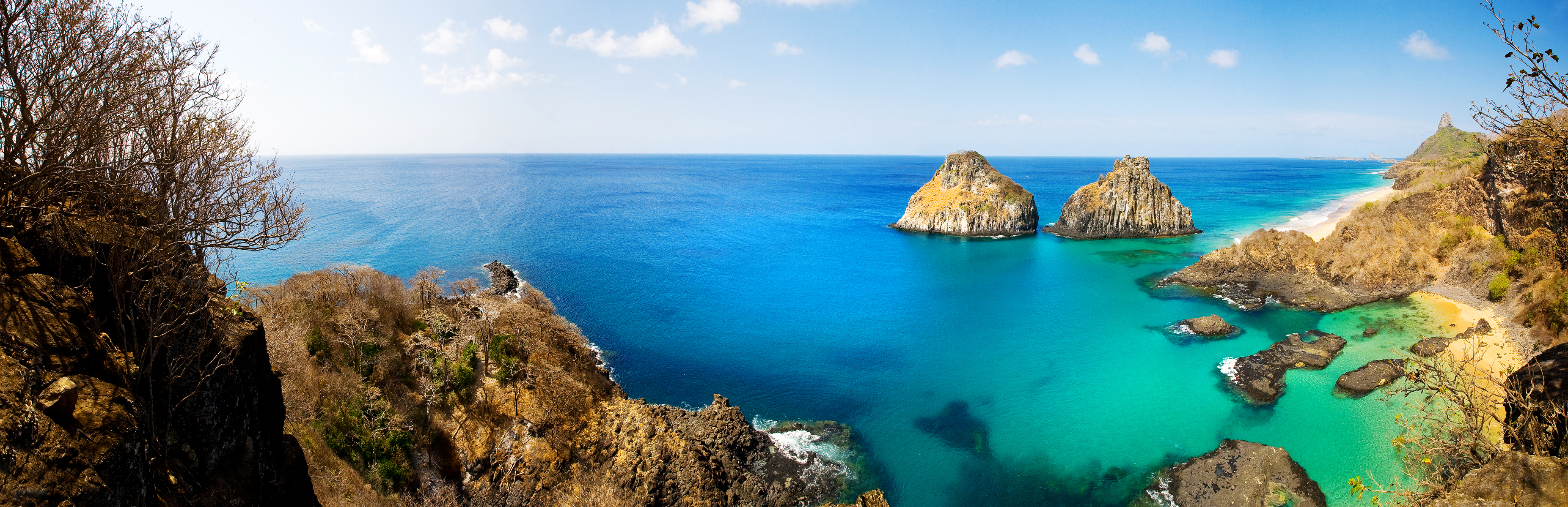 Baía dos Porcos